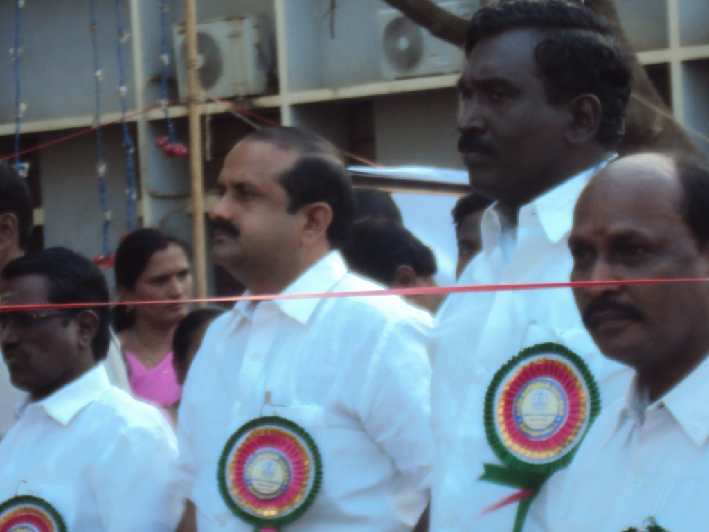 தமிழக அமைச்சர்கள் ரமணாவும் (இடமிருந்து இரண்டாவதாக இருப்பவர்) மூர்த்தியும் (வலமிருந்து இரண்டாவதாக இருப்பவர்)